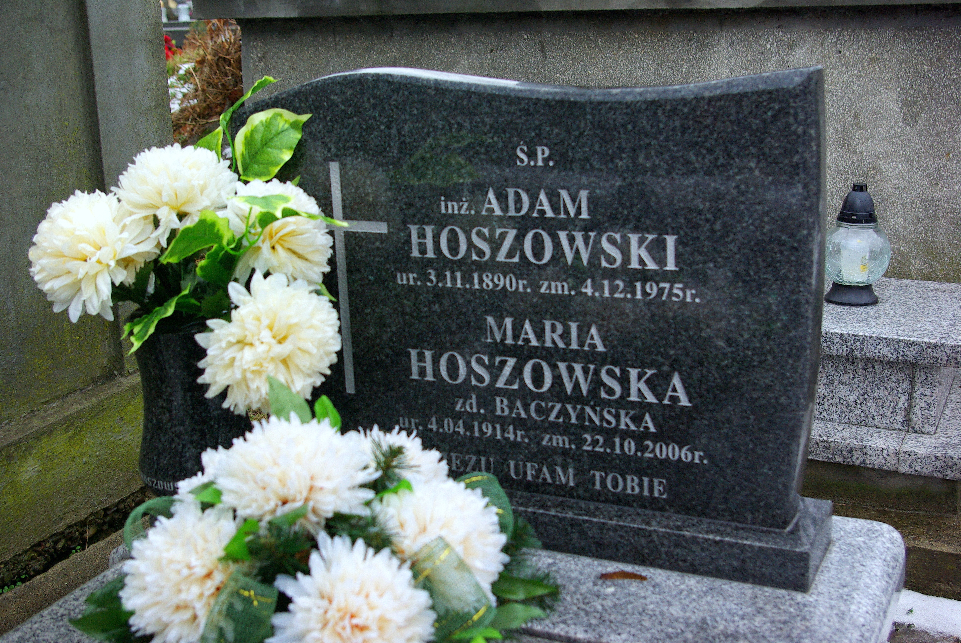 Grobowiec Adama i Marii Hoszowskich na Cmentarzu Centralnym w Sanoku.